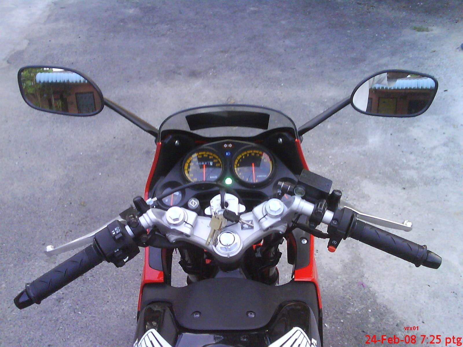 CBR150R Meter Panel